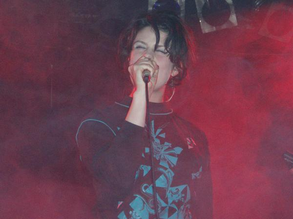 Ema Brabcová během koncertu v pražském klubu Roxy